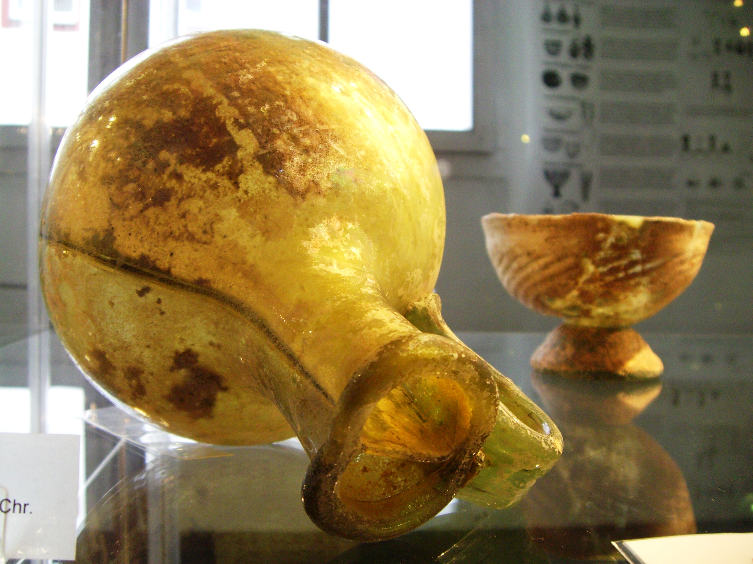 Glasmuseum Wertheim, Deutschland, Main-Tauber-Kreis, Gründung 1976, Objekte: Antikes Glas: Römischer Scheidekrug, Syrien, 2. – 3. Jh. n. Chr.